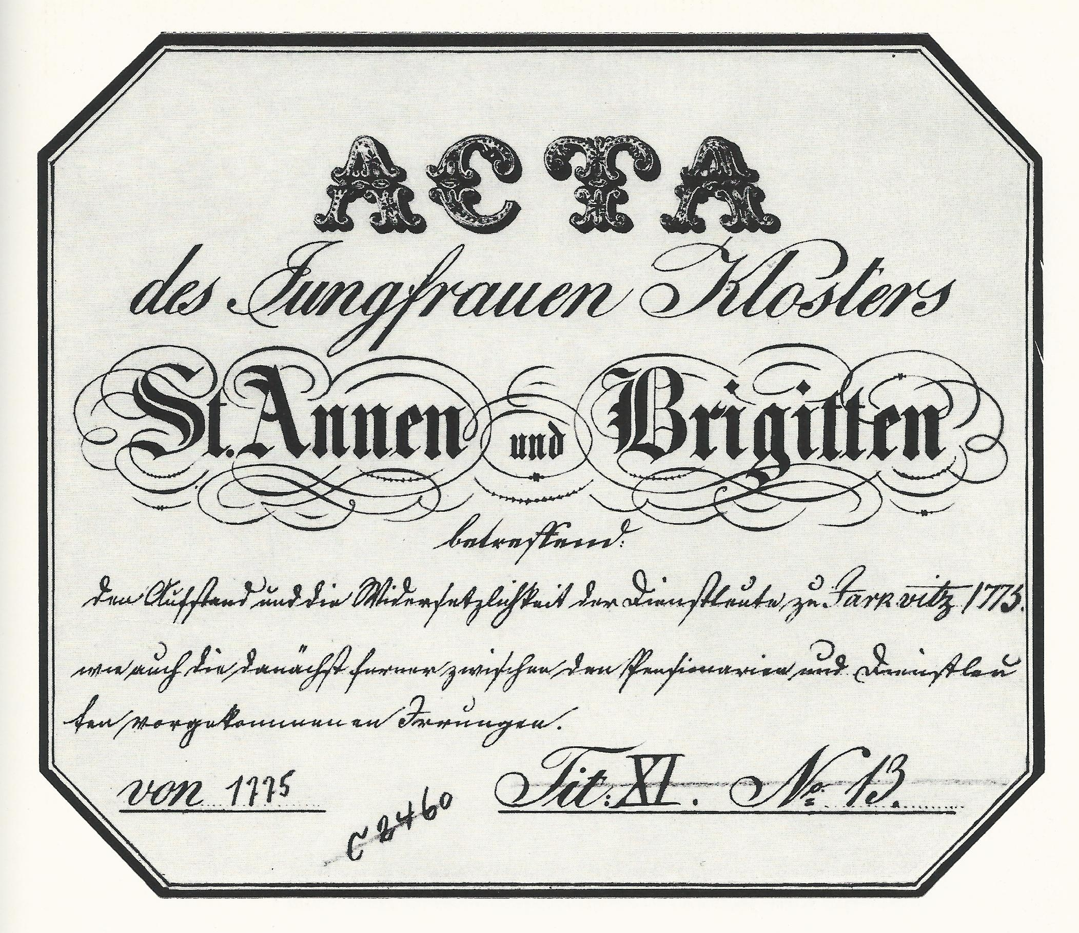 Aktentitel über einen Aufstand der Landbevölkerung auf Rügen